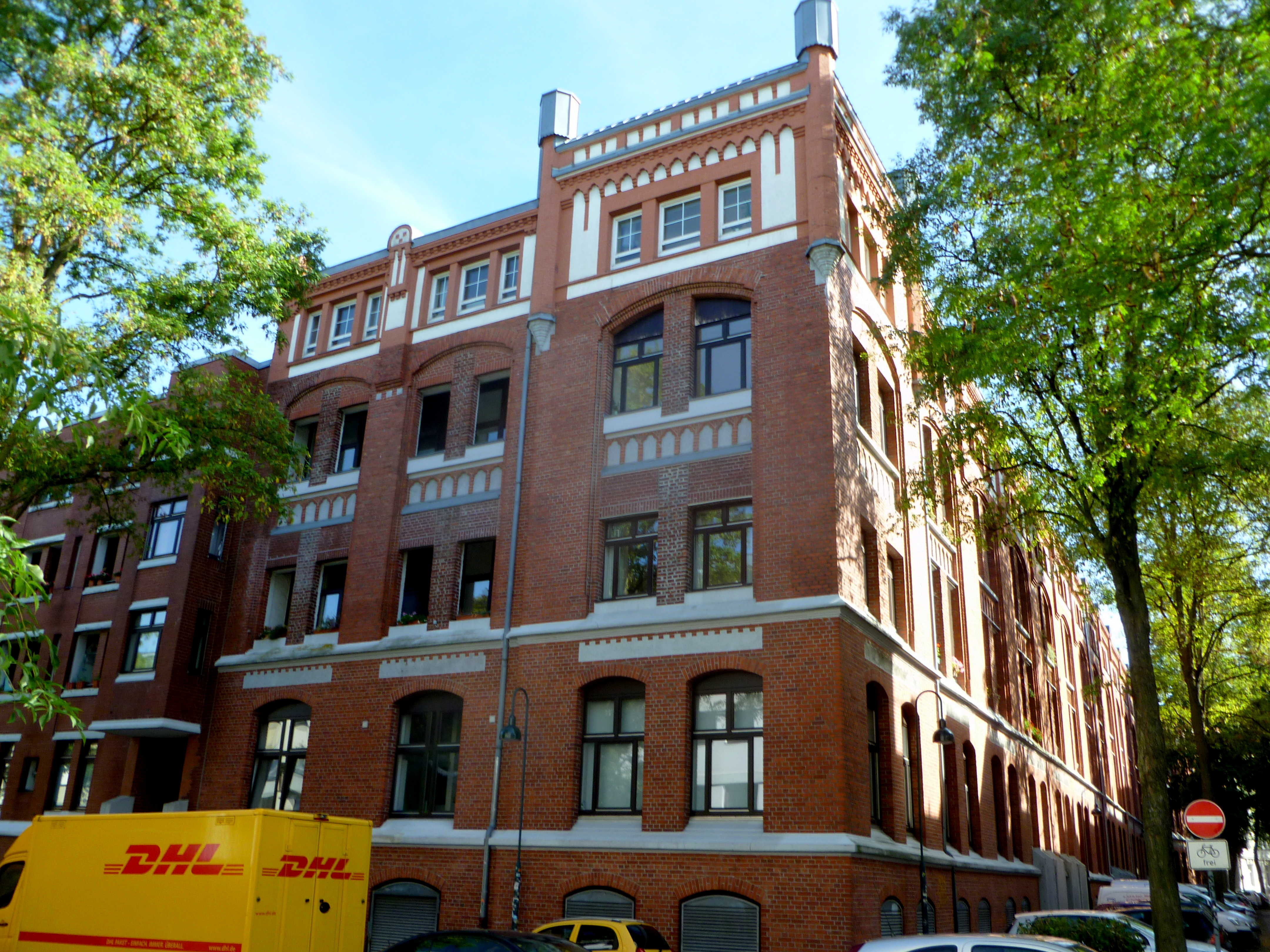 ehem. Tuchfabrik Delius in der Deliusstraße Aachen, Baudenkmal